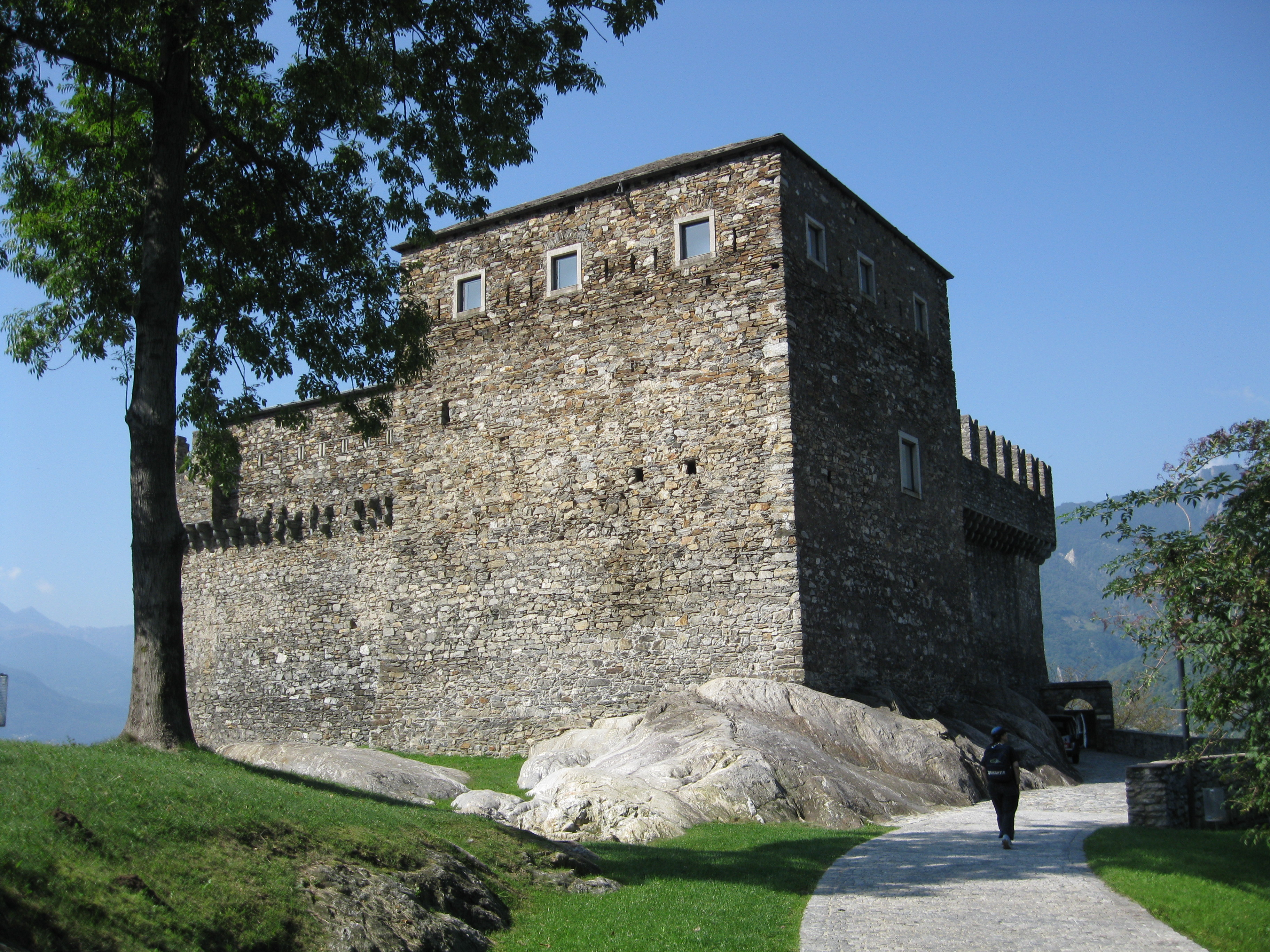 טירת סאסו קורבארו בבלינצונה